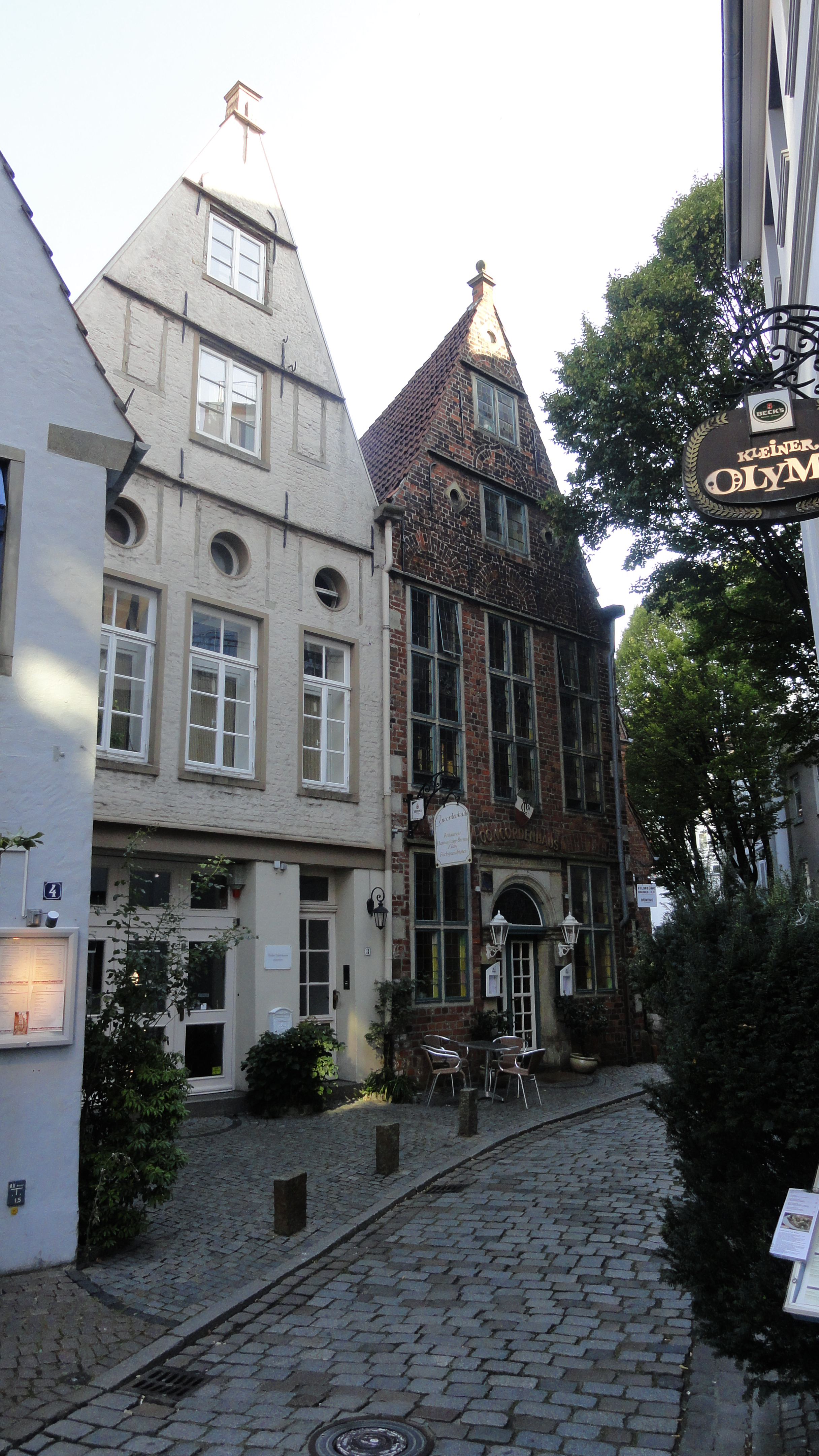 Bremen, Hinter der Holzpforte 3 (weiß geschlämmtes Ziegelgebäude)Das links abgebildete Objekt ist ein geschütztes Kulturdenkmal in der Freien Hansestadt Bremen, mit der Nr. 0606 beim Landesamt für Denkmalpflege registriert.